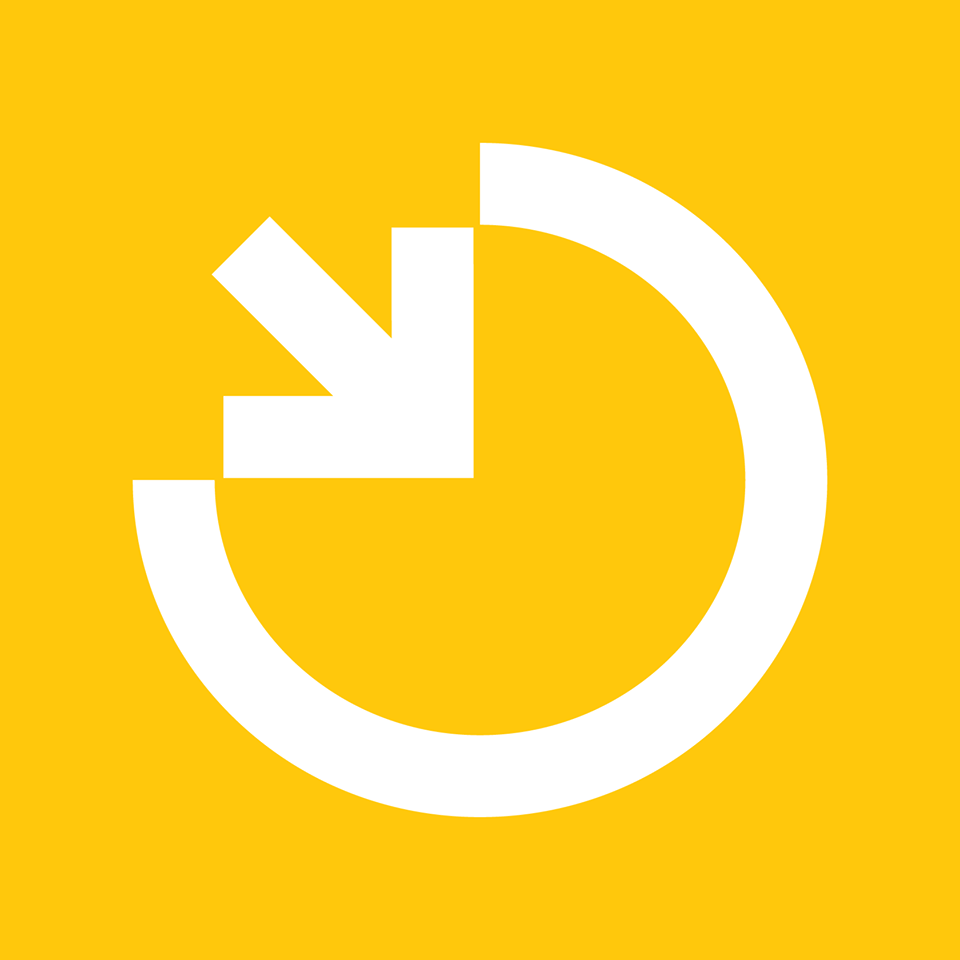 Logo von GermanZero